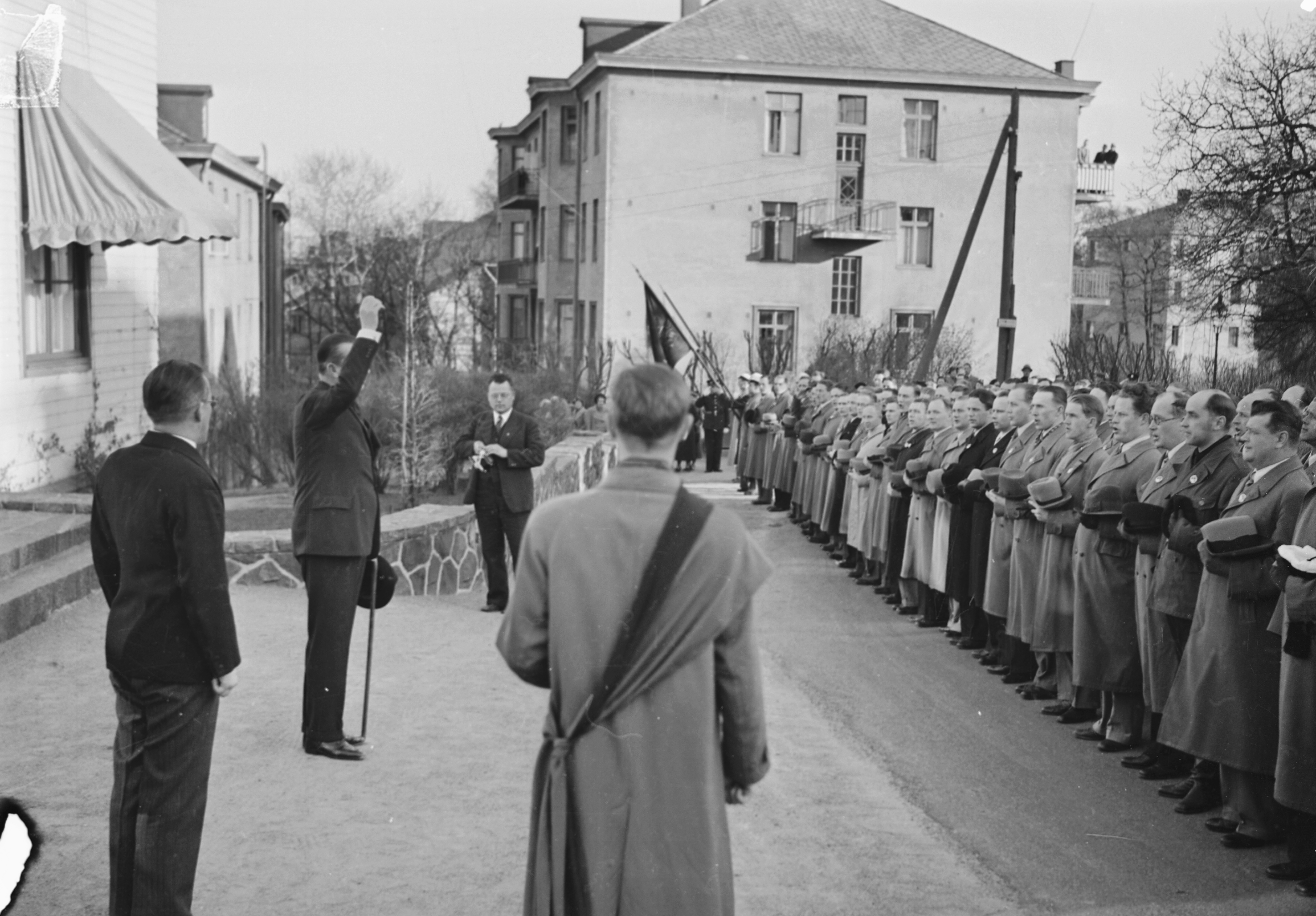 Carl Gustaf Mannerheim huudattaa Akateeminen Karjala-Seuran jäseniä jotka ovat kunniakäynnillä hänen kotipihallaan Kaivopuistossa 16.5.1938. Akateemisen Karjala-Seuran kunniakäynti liittyi sisällissodan päättymisen 20-vuotispäivään.